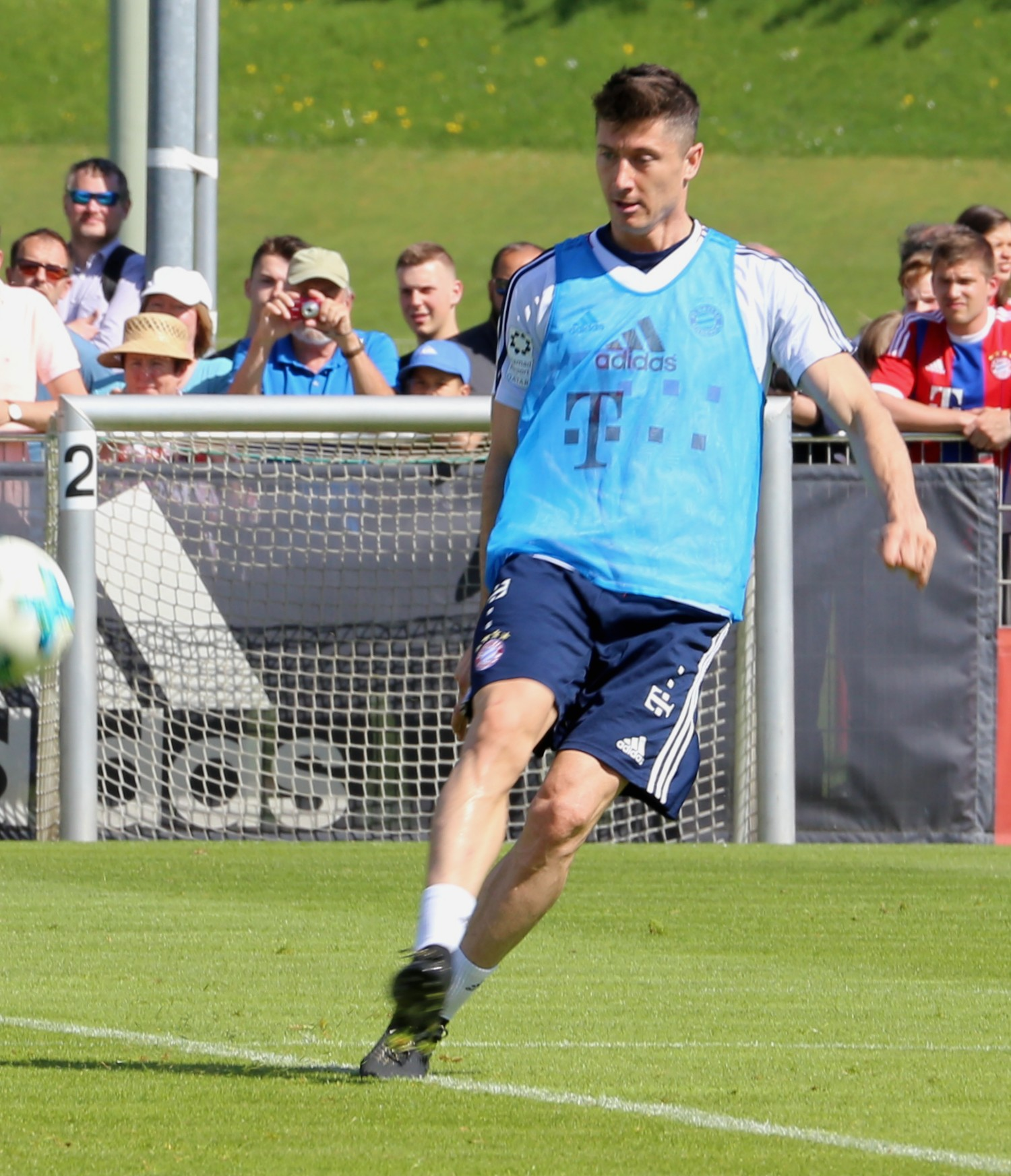 Robert Lewandowski, am 8. Mai 2018 beim Training auf dem Gelände des FC Bayern München